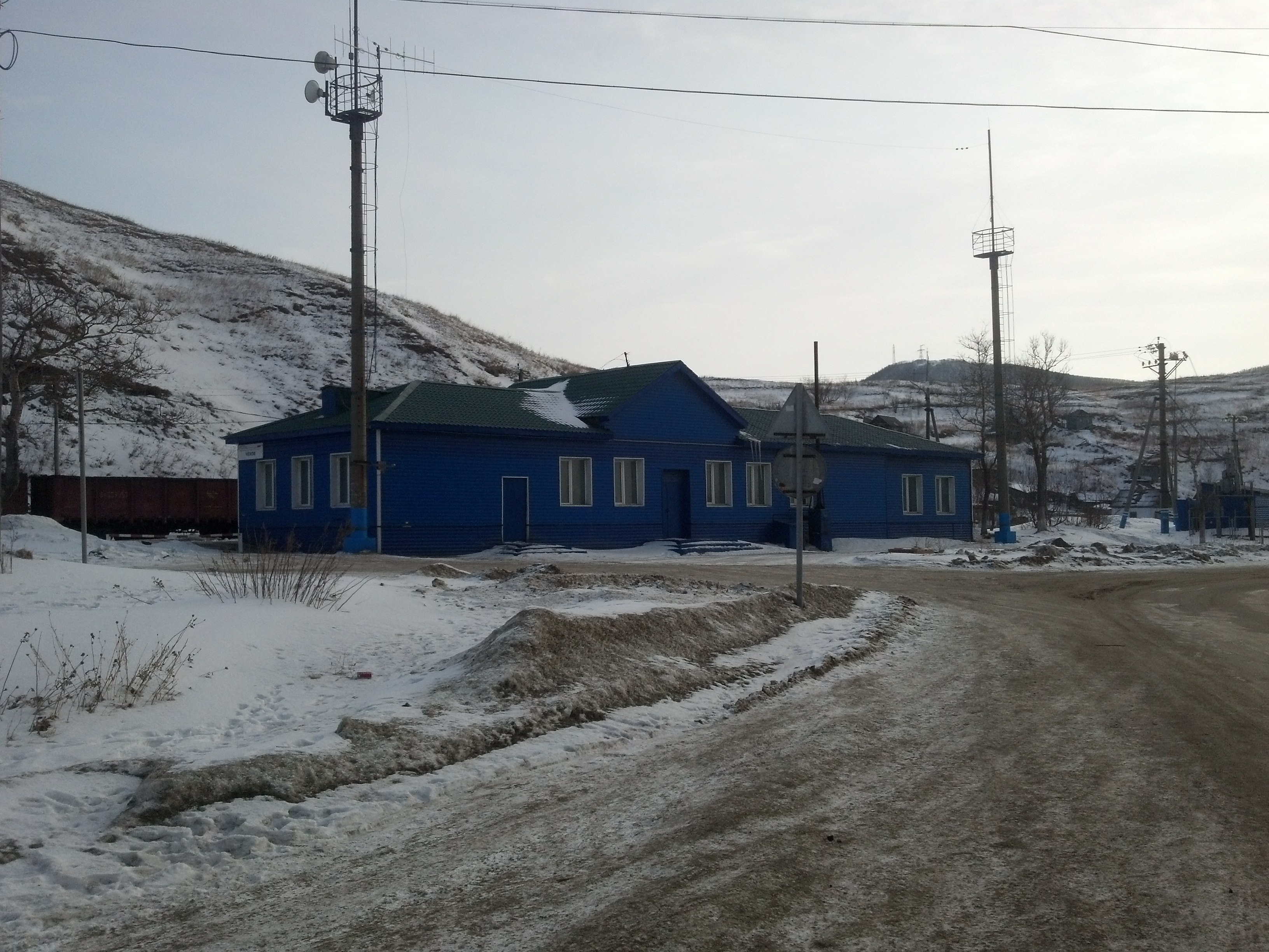 станция Чехов-Сахалинский ДВЖД